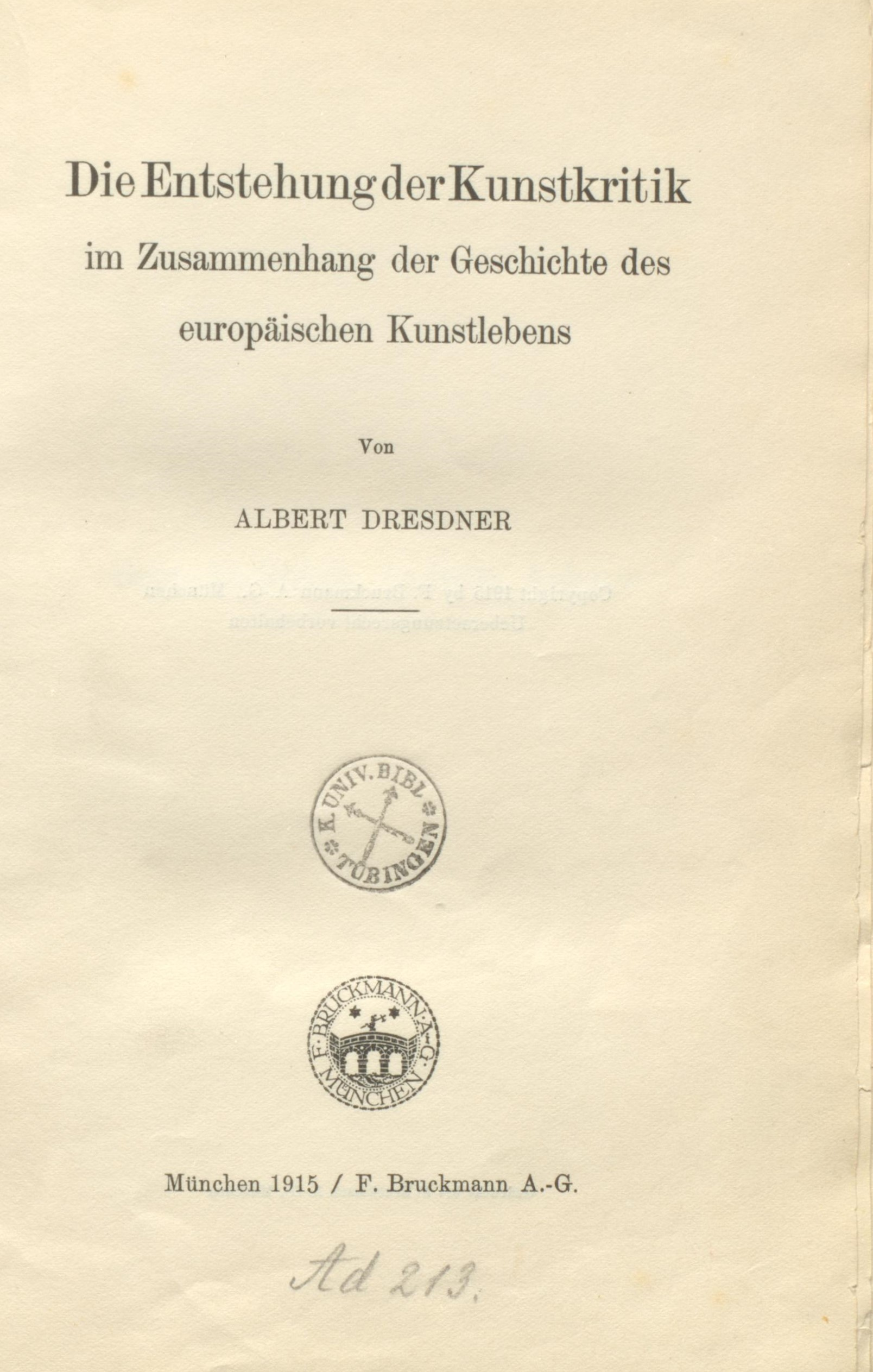 Albert Dresdner Die Entstehung der Kunstkritik 1915 Titel